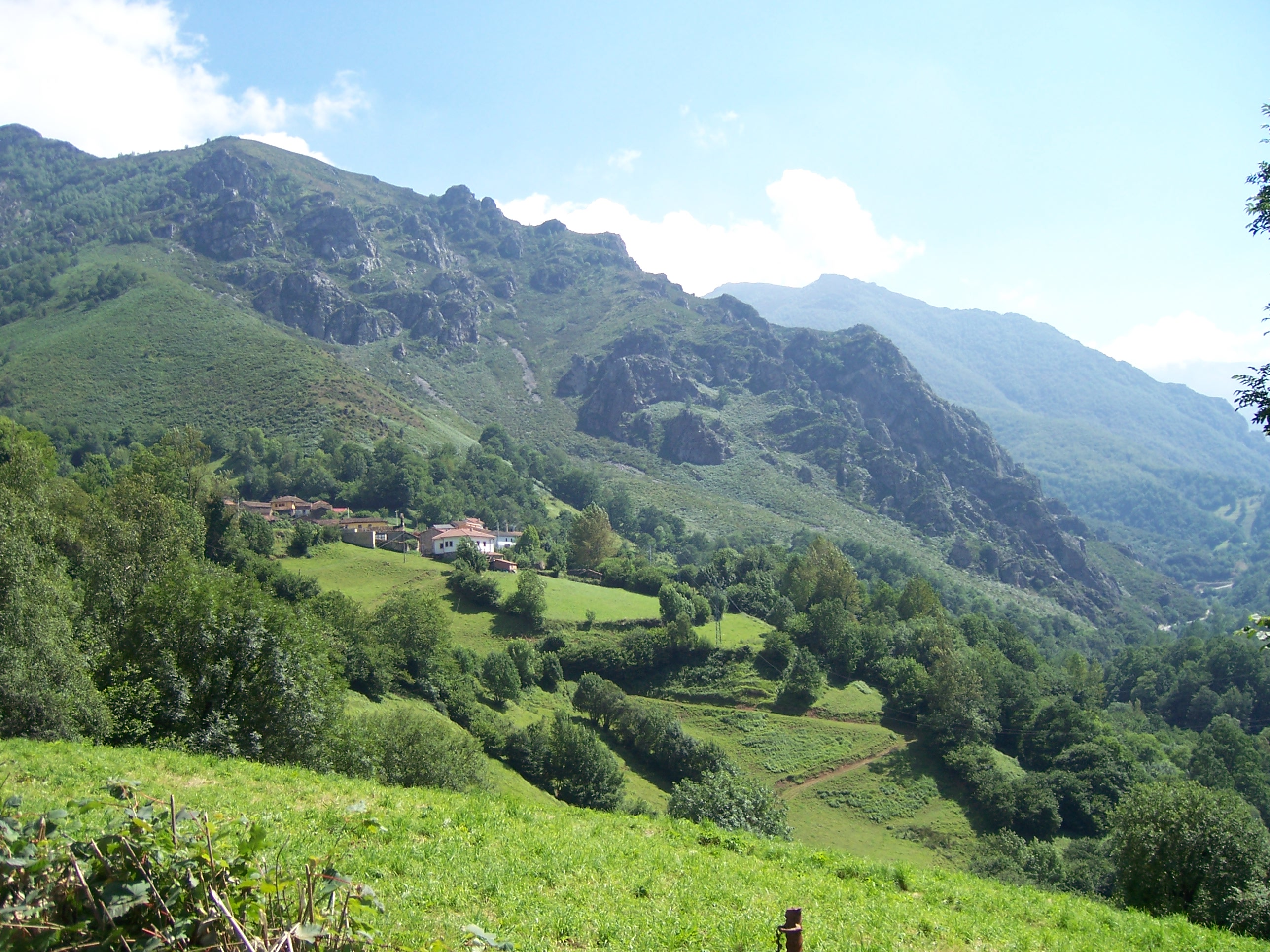 Vista de la parroquia de Corés, en Somiedo (Asturias), España.